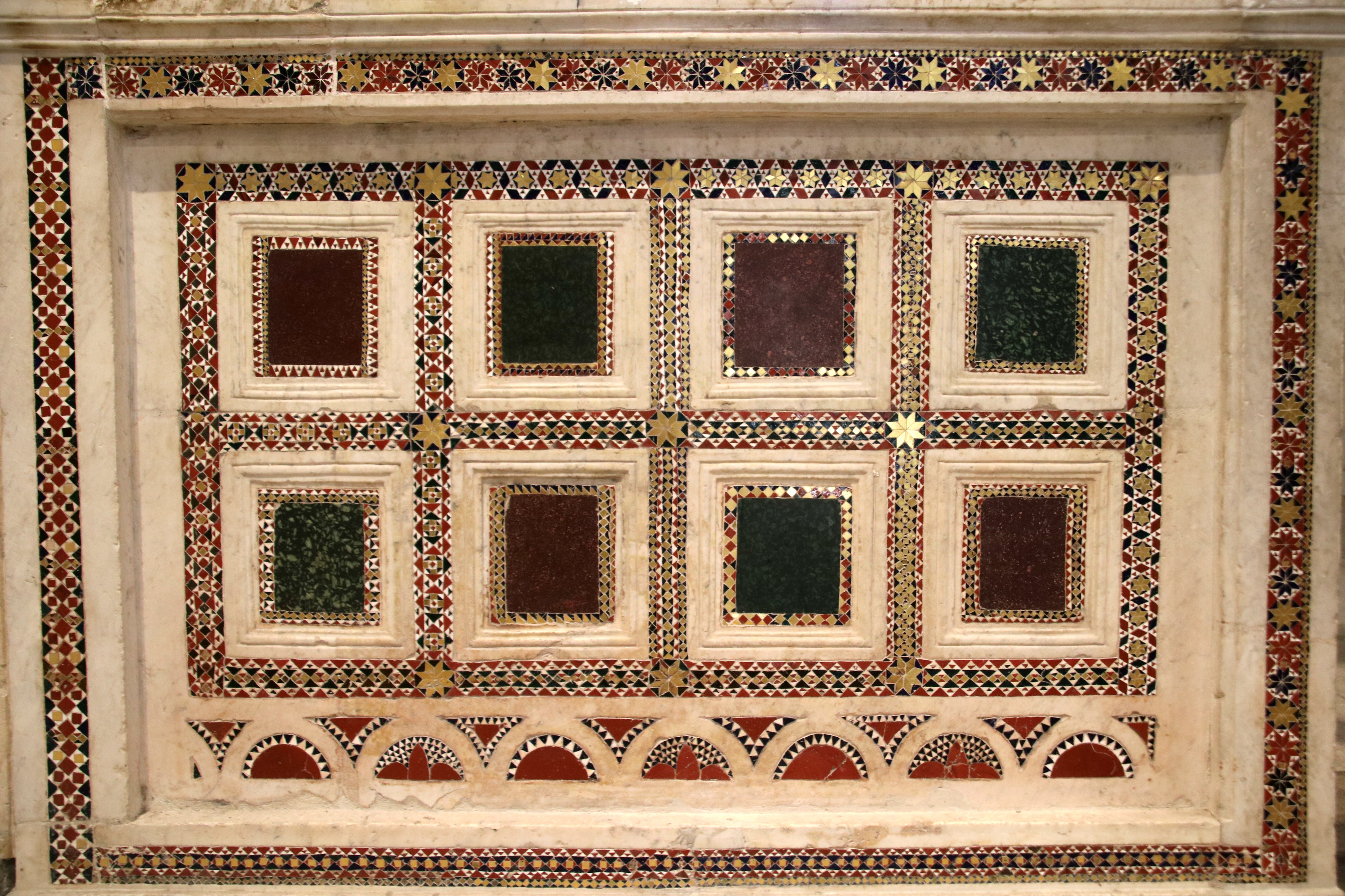 Iconostasi, Chiesa di San Pietro (Massa d’Albe)